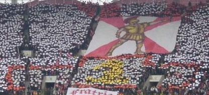 Спартак-цска. 2006 год